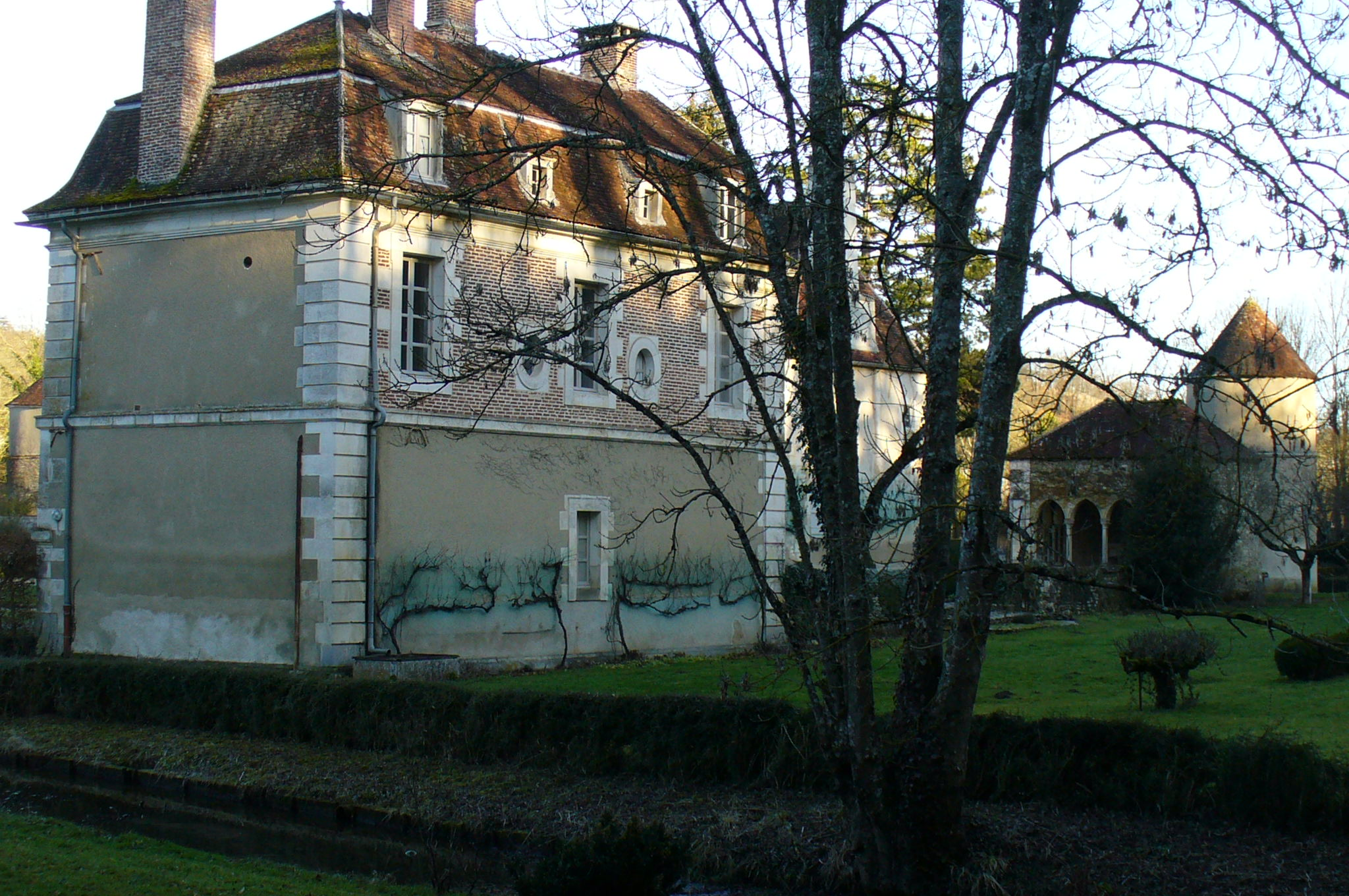 Chateau d'Avigneau (Yonne)